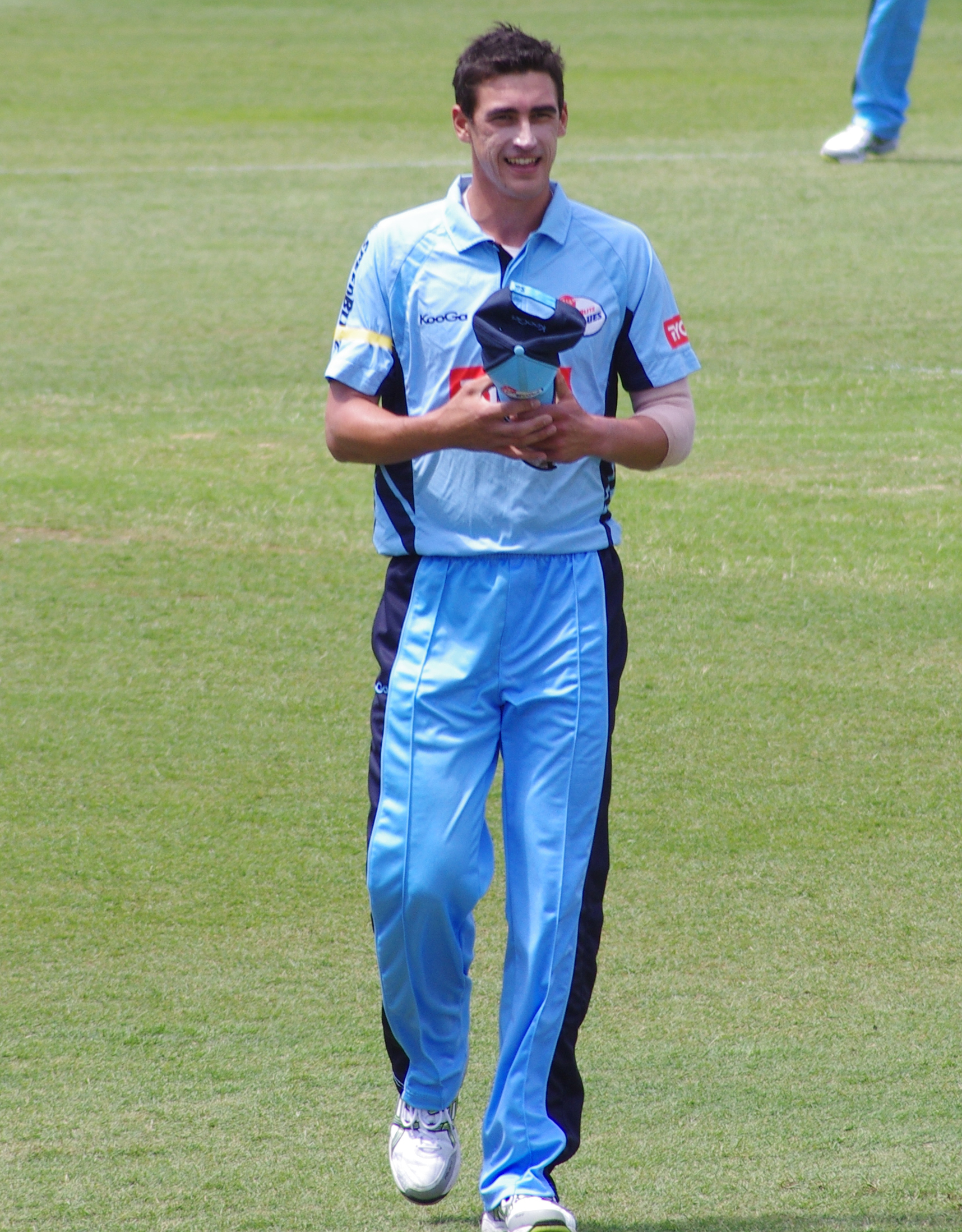 Mitchell starc